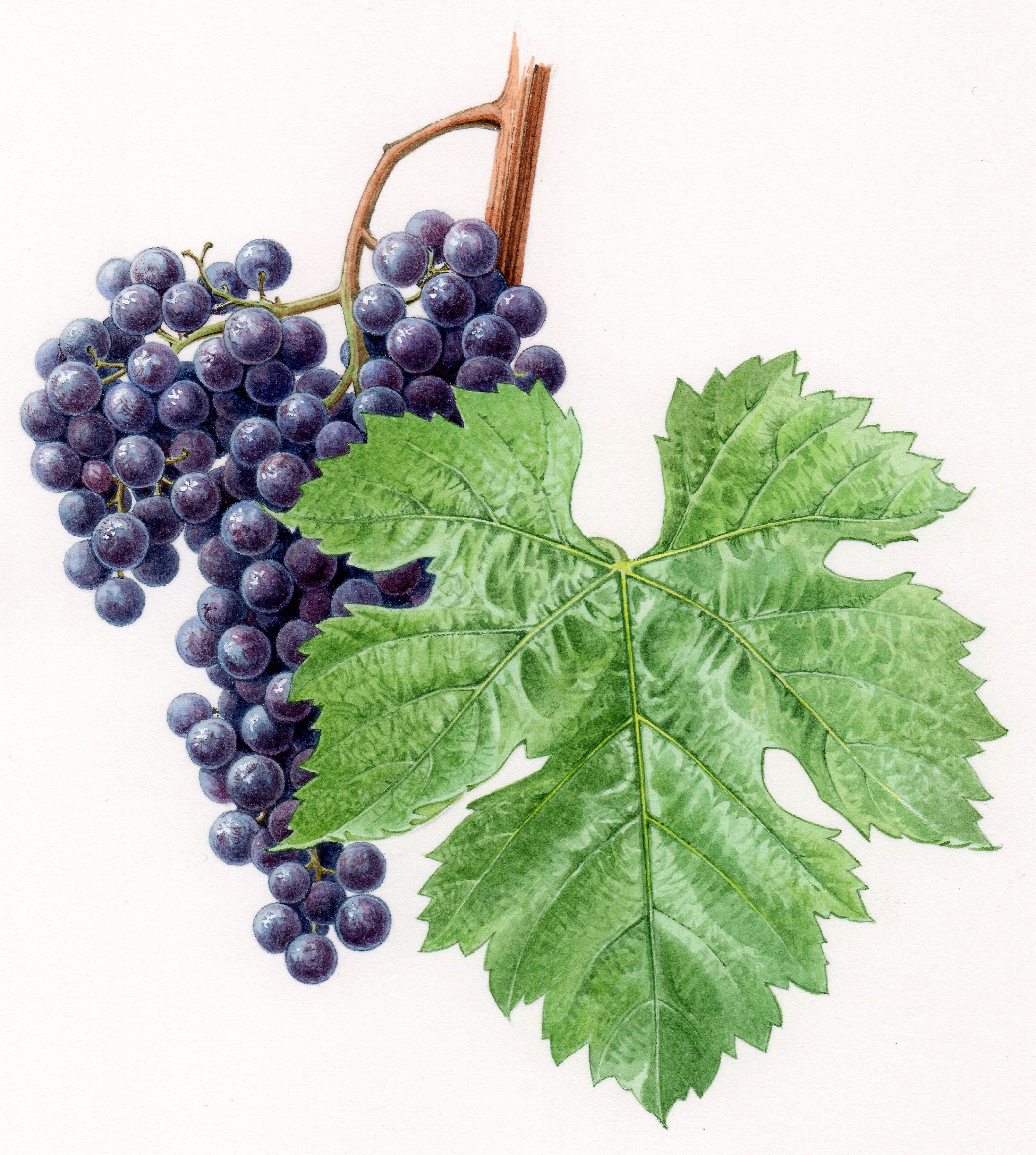 Aquarelle originale pour les Cépages de France (2001)